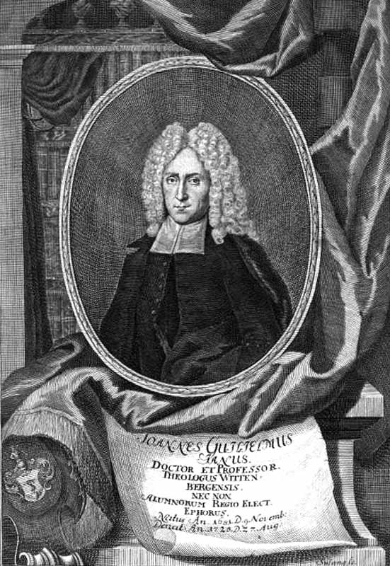 Johann Wilhelm Jahn, (1681-1725) deutscher evangelischer Theologe und Historiker